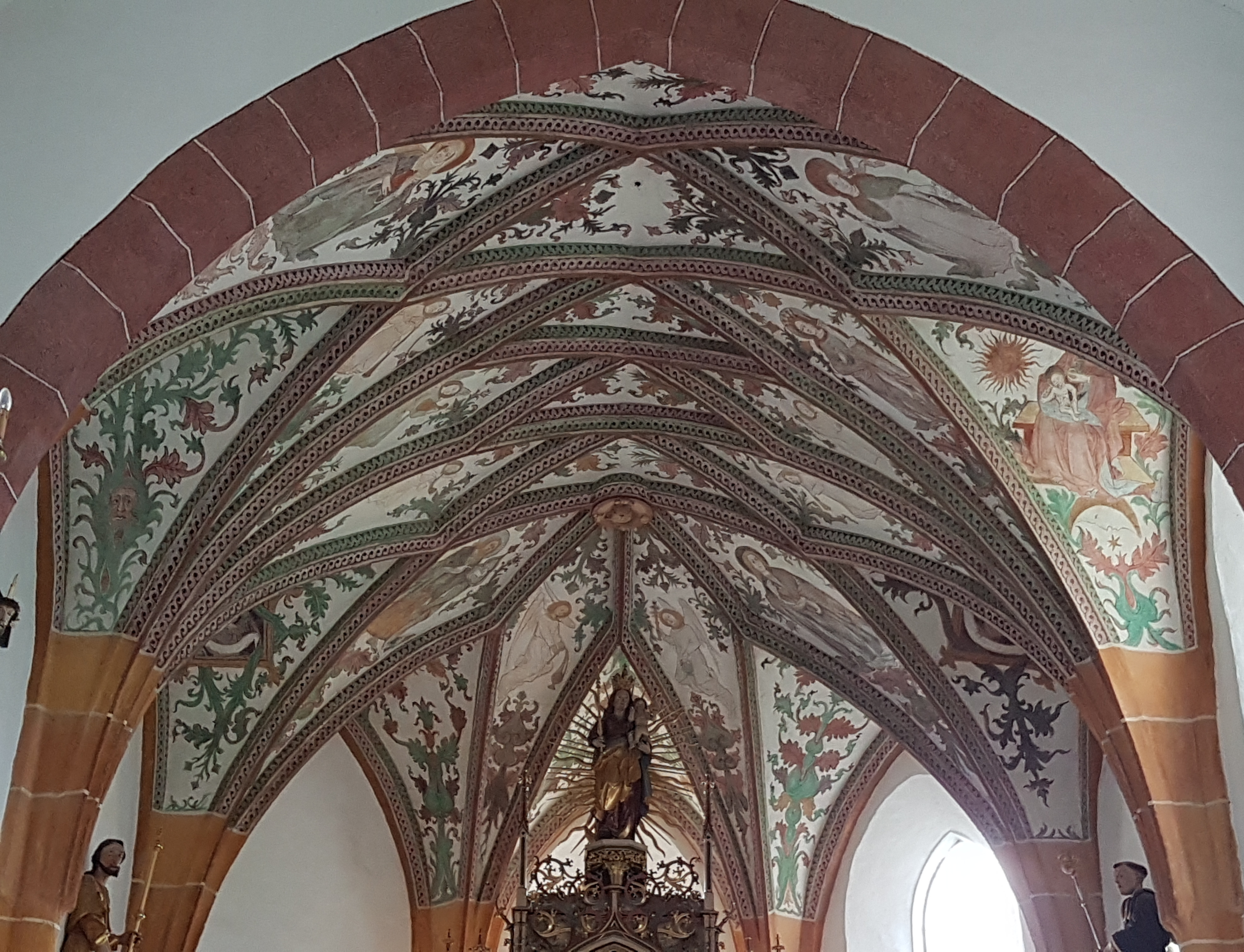 Kath. Filialkirche hl. Johannes der Täufer und ehem. Friedhof